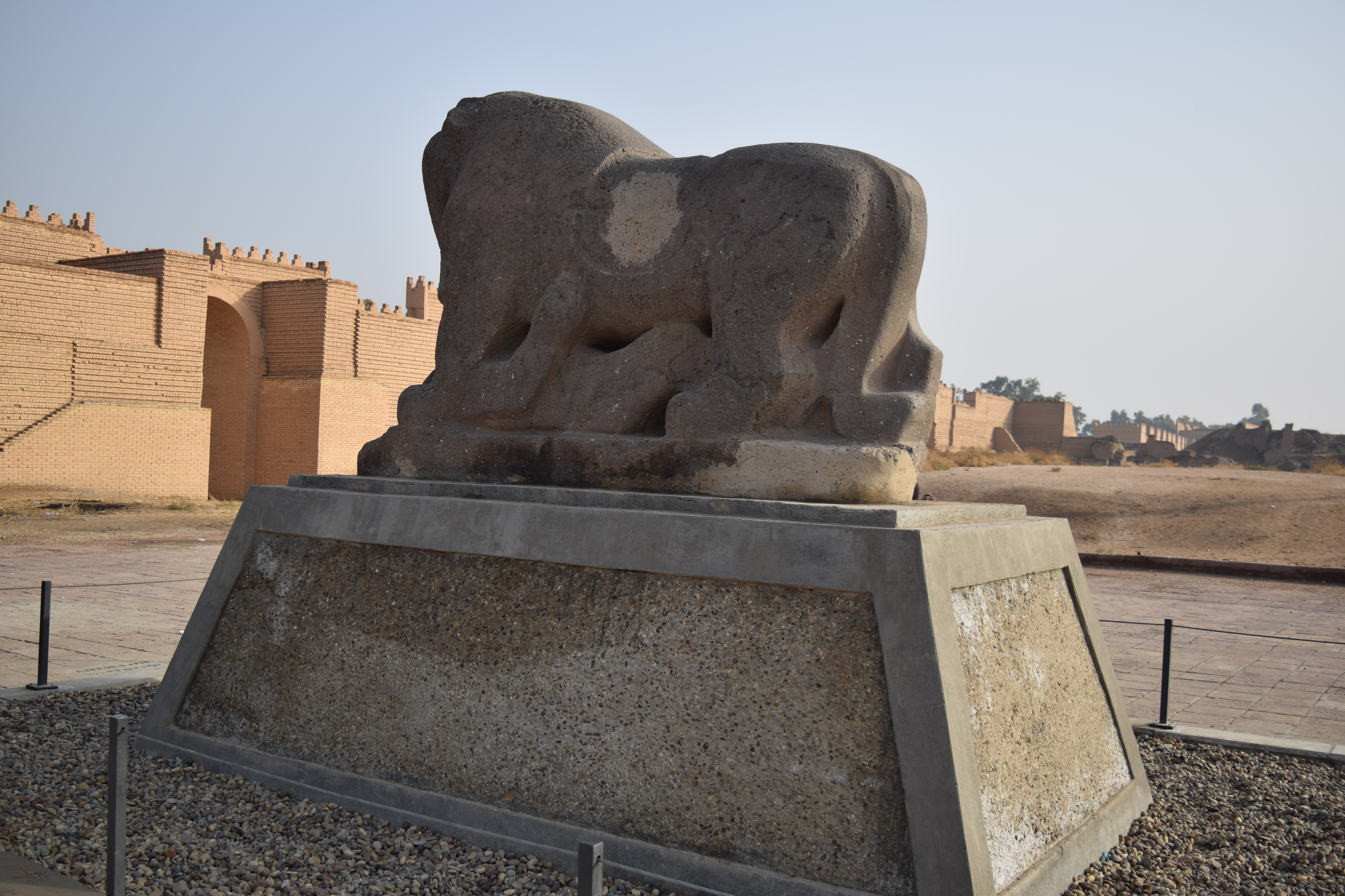 صورة لأسد بابل بعد أعمال الصيانة